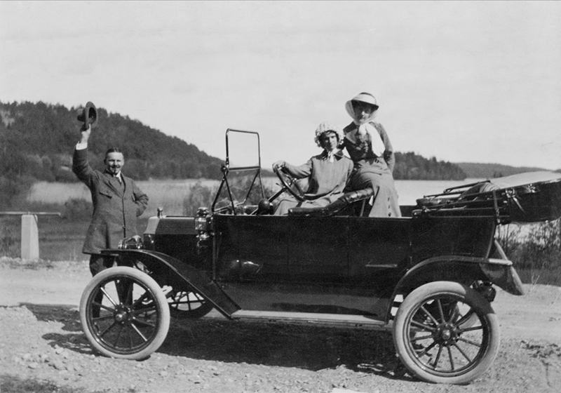 Stockholm. "Direktör Erik Hagström, Wasabolaget, med sin Ford, hustru och svägerska. Omkr. 1910."